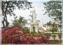 PEDRO CARBO TIERRA DONDE PERTENECE ADRIANA PEÑAFIEL